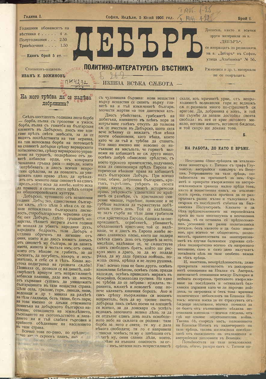 Вестник "Дебър", брой 1, 5 юни 1905.